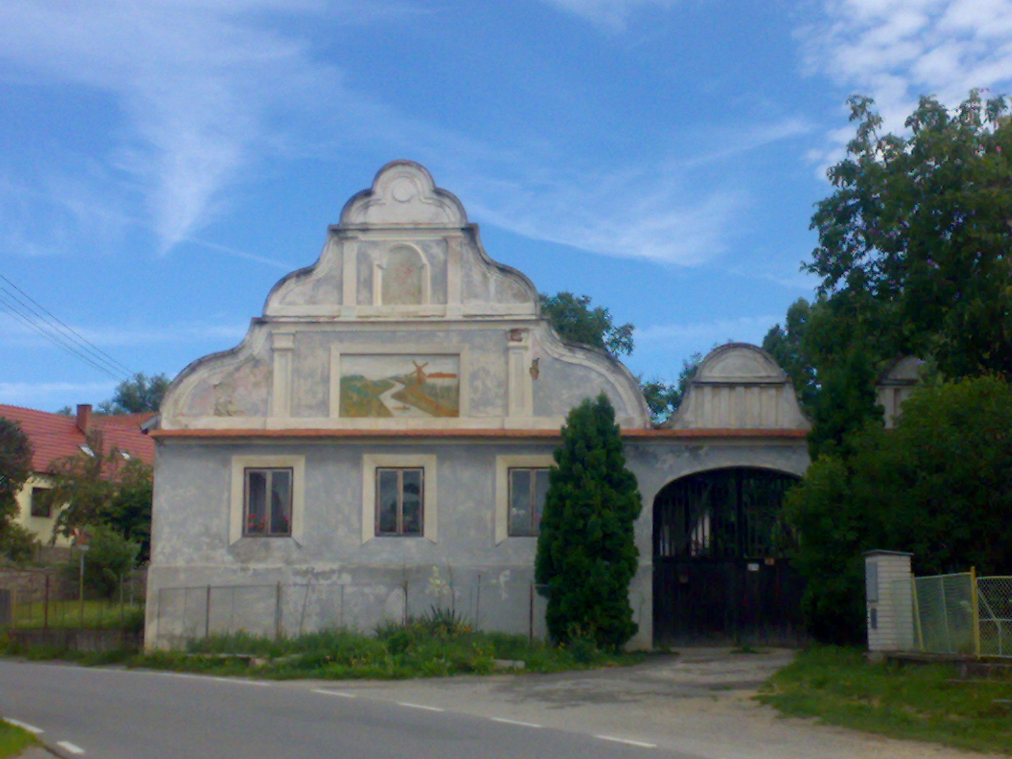 Litochovice, průčelí statku na návsi